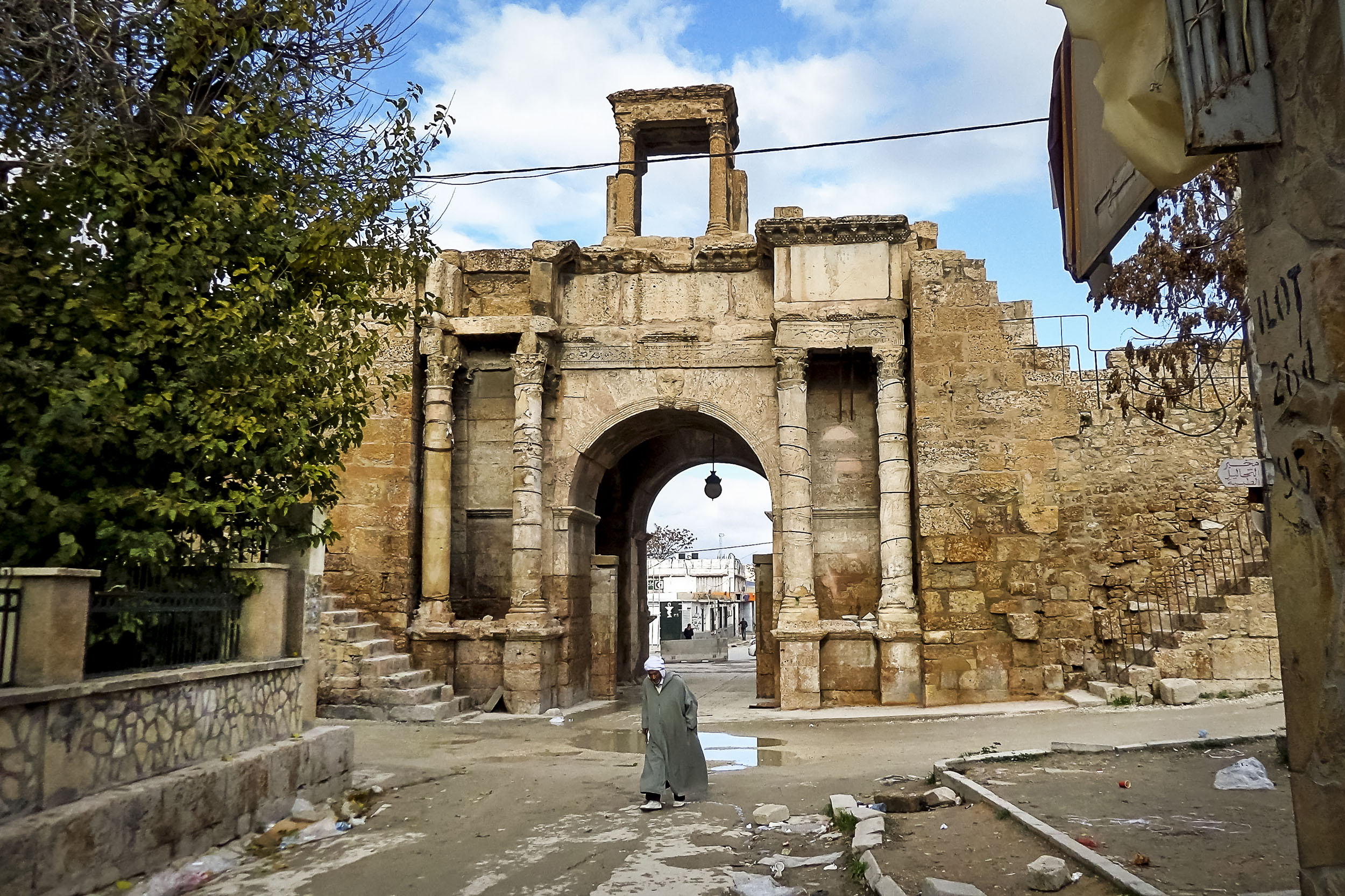 Wilaya de Tébessa ولاية تبسة Porte Caracalla - Tébessa باب كركلا - تبسة